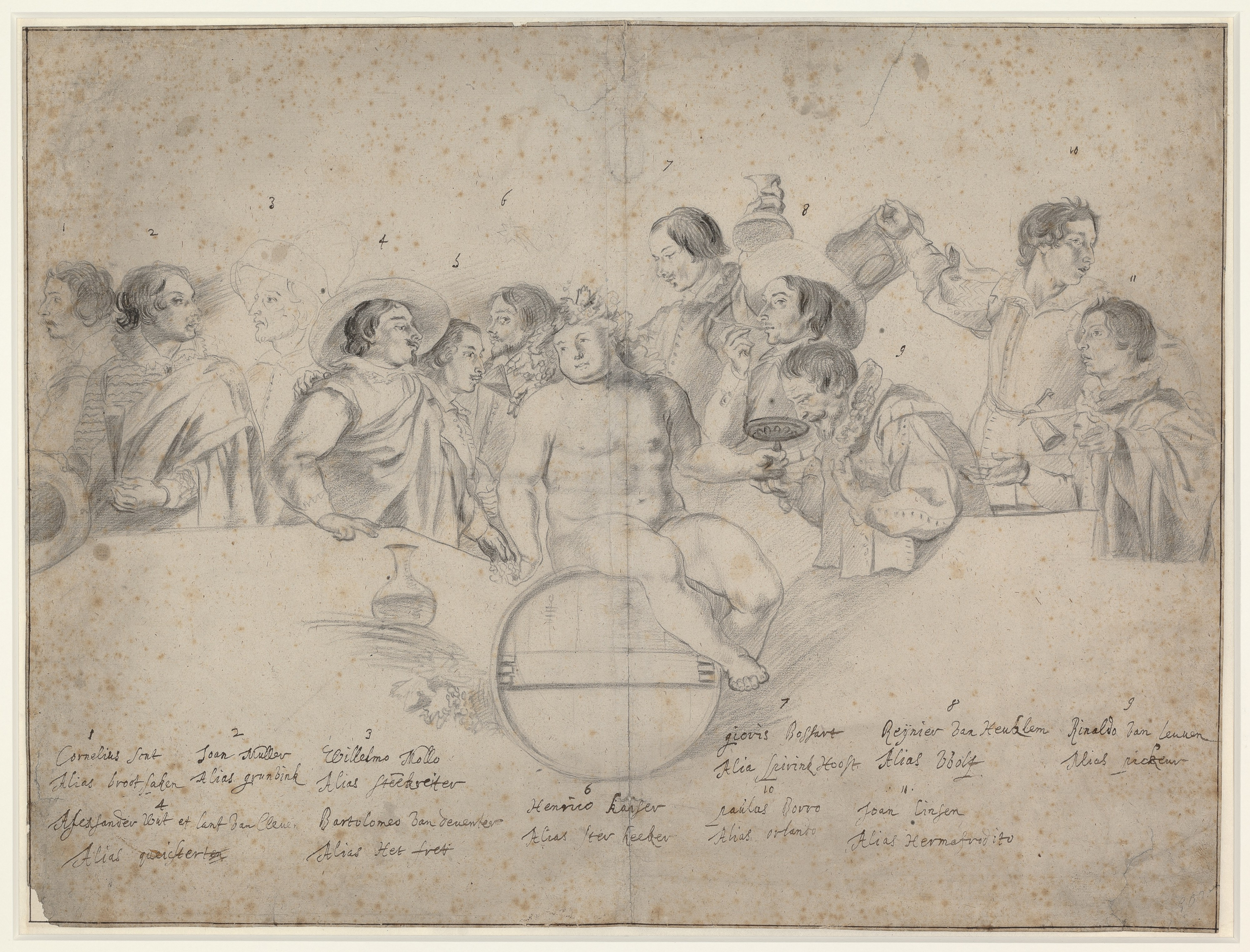 Anonymous. Serie of Portraits of Bentvueghels; 1. Cornelis Schut Alias Brootsaken, 2. Joan Muller Alias Grunvink, 3. Willelmo Mollo Alias Steekreiter, 4. Alexander uyt et lant van Cleve Alias Quicstert, 5. Bartolomeo van deventer Alias Het Fret, 6. Henrico Kaiser Alias Ster Keeker, 7. Gioris Bossart Alias Spirink Hooft, 8. Reijnier van Heuklem Alias Wolf, 9. Rinaldo van Leuven Alias Pickeur, 10. Paulus Borro Alias Orlando, 11. Joan Linsen alias Hermafrodito, c. 1623. Red and black chalk, 417 x 552 mm © Museum Boijmans Van Beuningen, Rotterdam